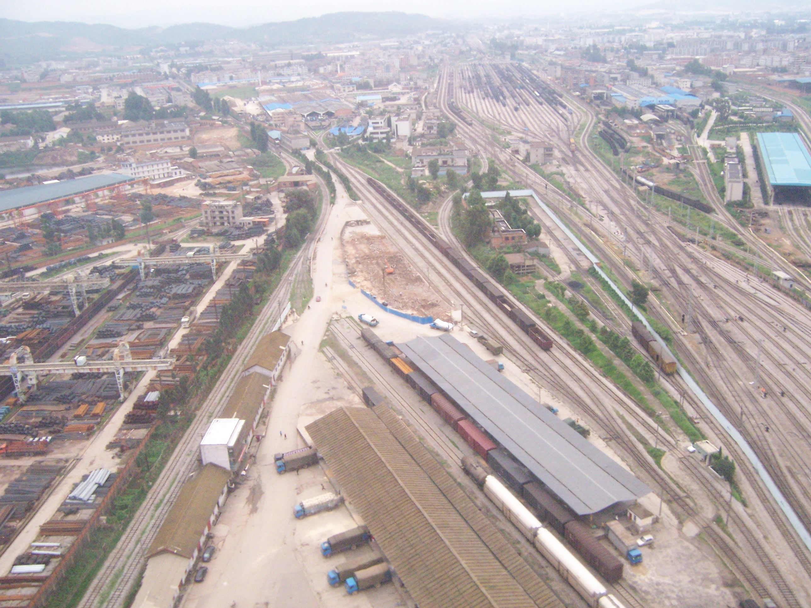 昆明火车站